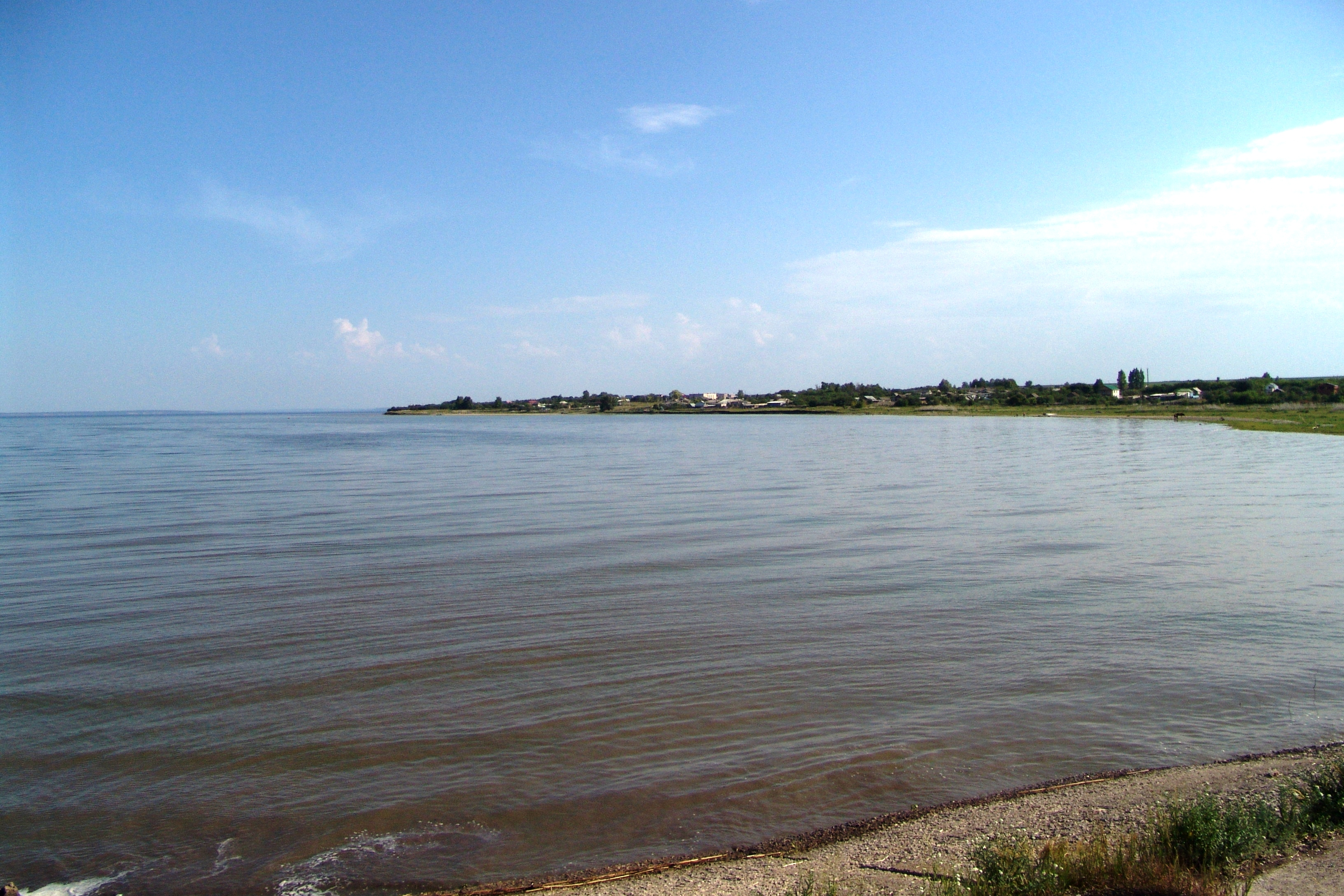 Село Подвалье на берегу Куйбышевского водохранилища, река Волга